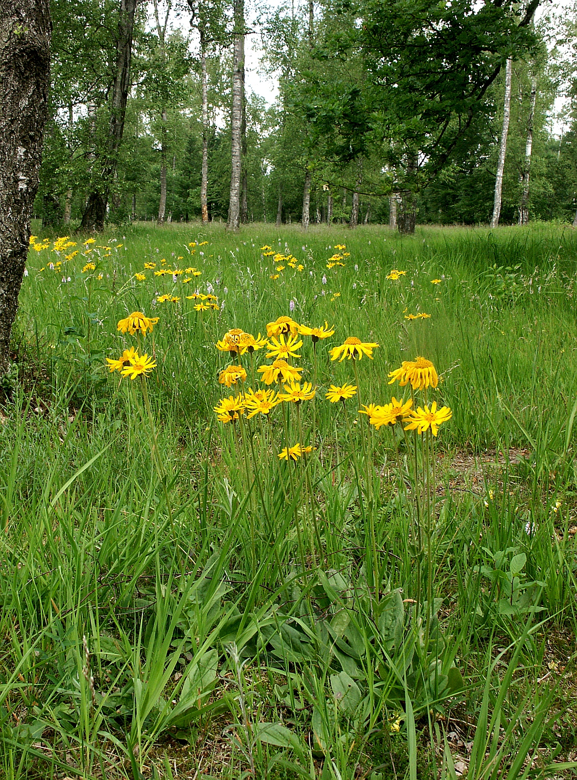 Arnica montana, Festuco-Genistetum sagittalis, Schwäbisch-Fränkischer Wald, Germany